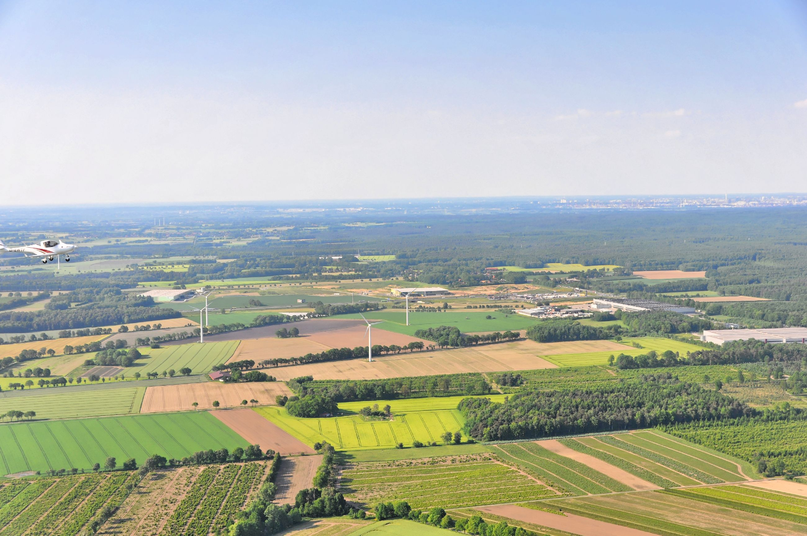 Überführungsflug vom Flugplatz Nordholz-Spieka über Lüneburg, Potsdam zum Flugplatz Schwarzheide-Schipkau